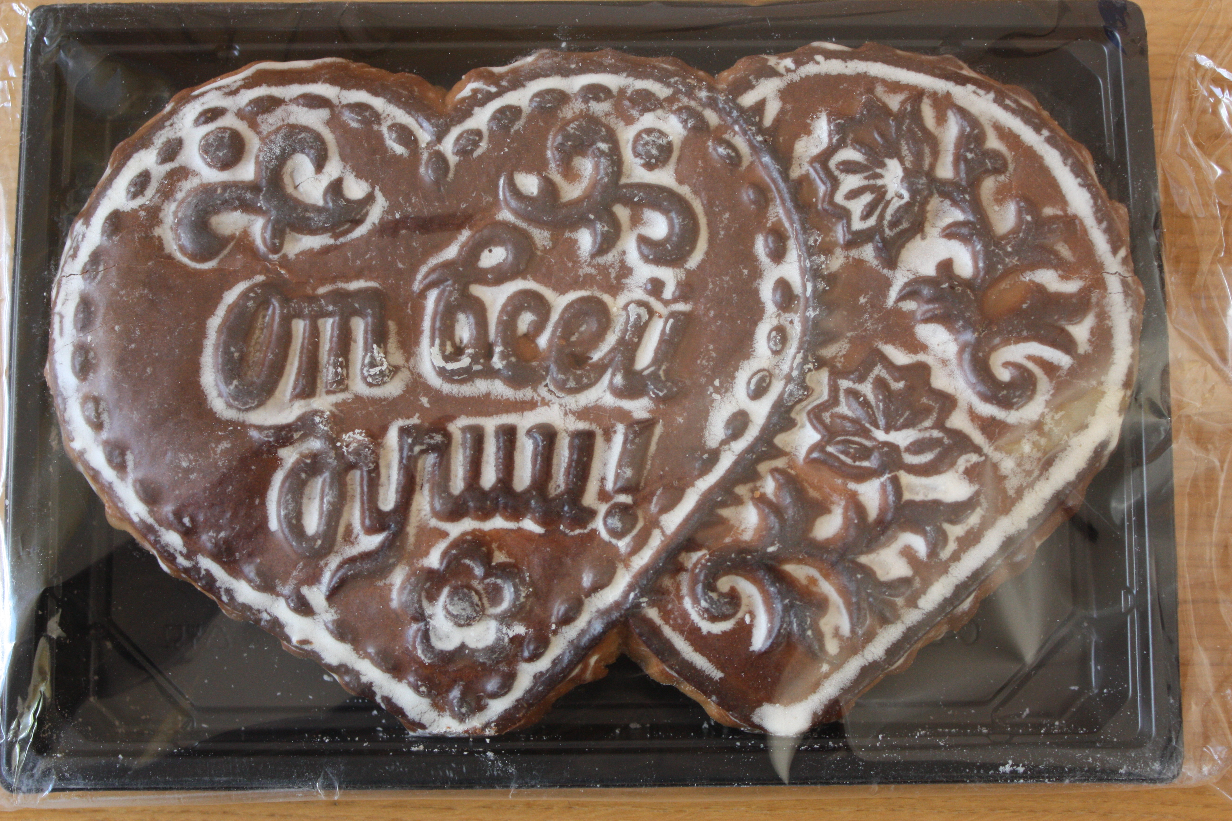 traditioneller russischer Pfefferkuchen aus Tula